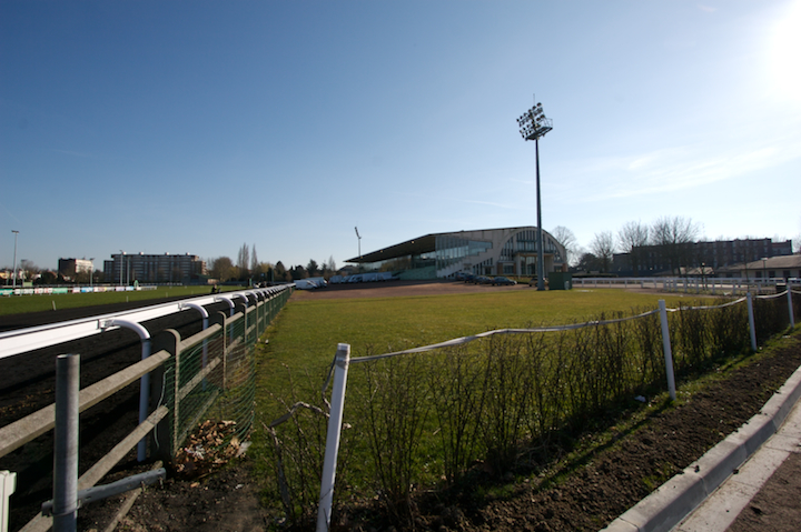 Les tribunes de l'hippodrome de Marcq-en-Baroeul